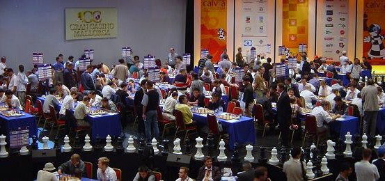 Spielsaal der Herren, Schacholympiade 2004 in Calvià